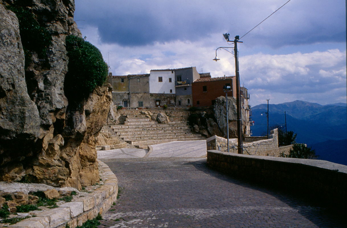 Pollina, Palermo, Sicily